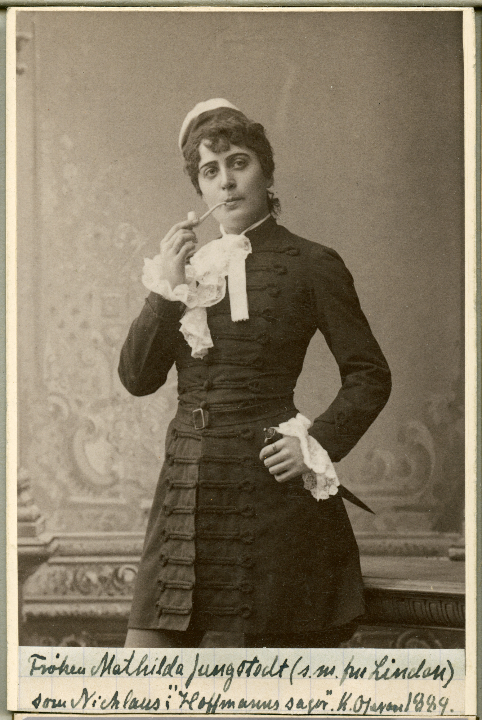 Mathilda Jungstedt som Nicklaus i Hoffmanns sagor, Kungliga Operan 1889